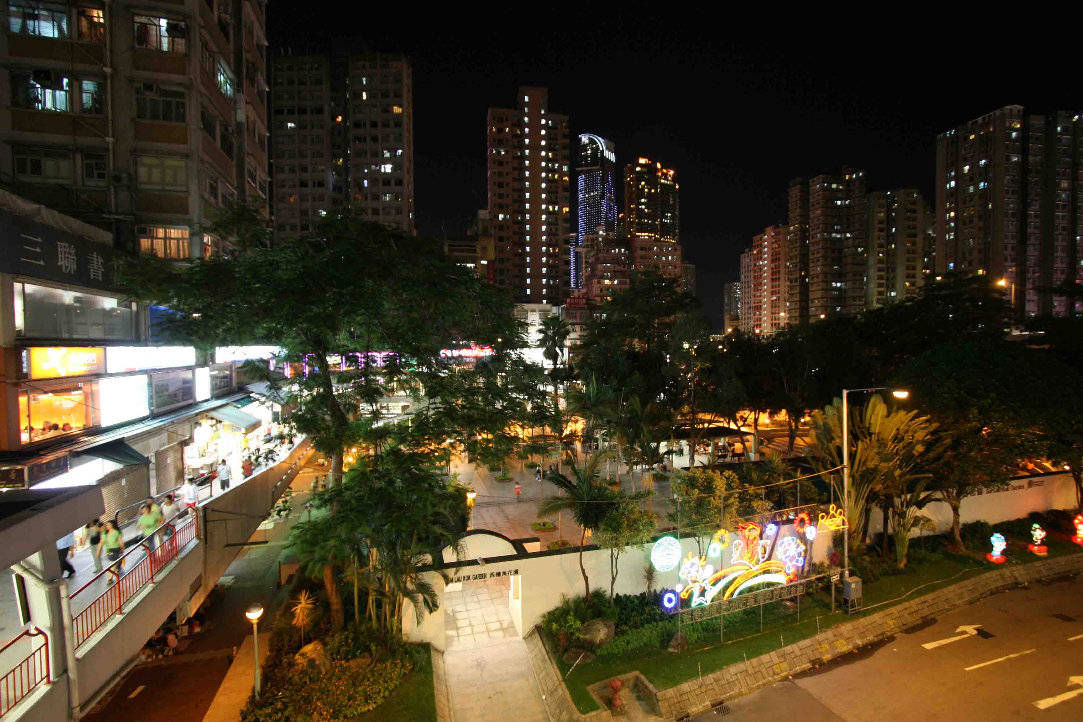 Sai Lau Kok Gardens, Tsuen Wan Station Night, Hong Kong